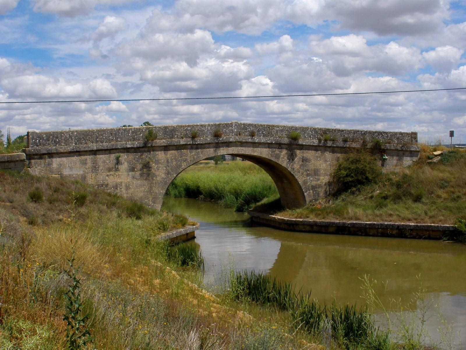 Puente de Amusco, Canal de Castilla (Palencia, Castilla y León, España)